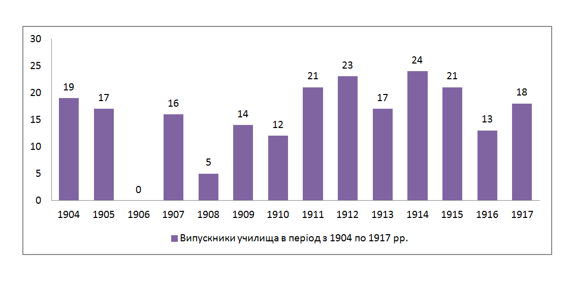 Діаграма випусків учнів Ніжинського нижчого технічного училища